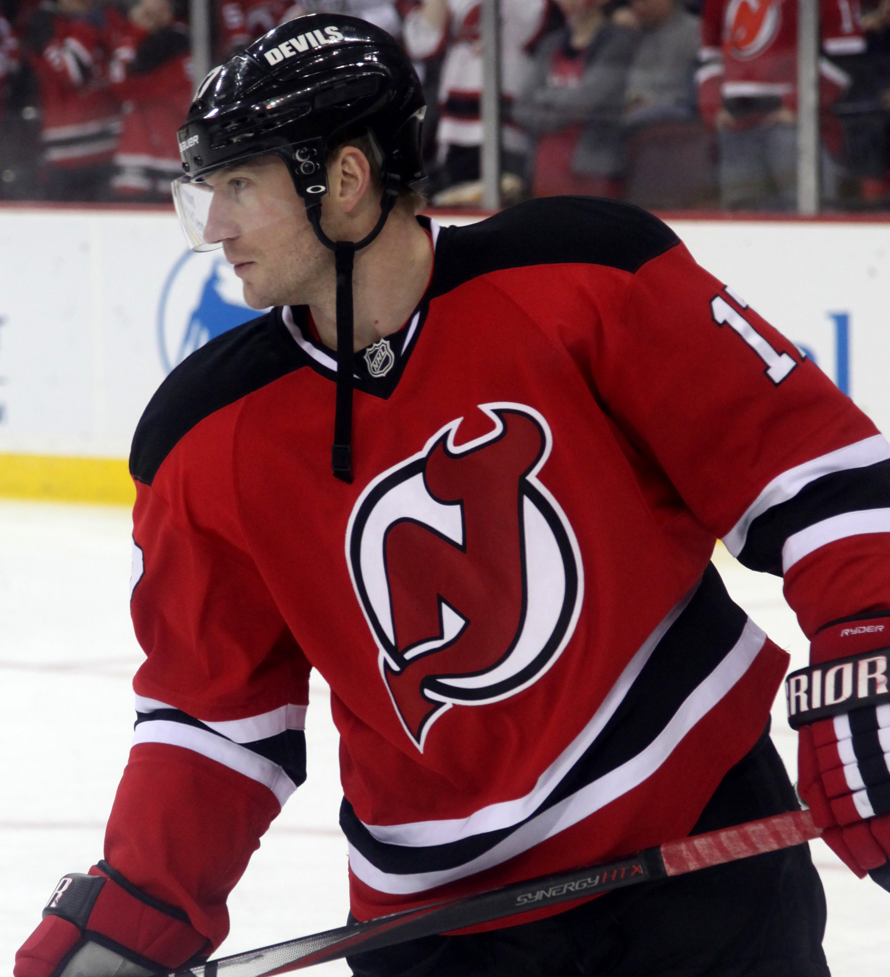 Ryder in 2014.